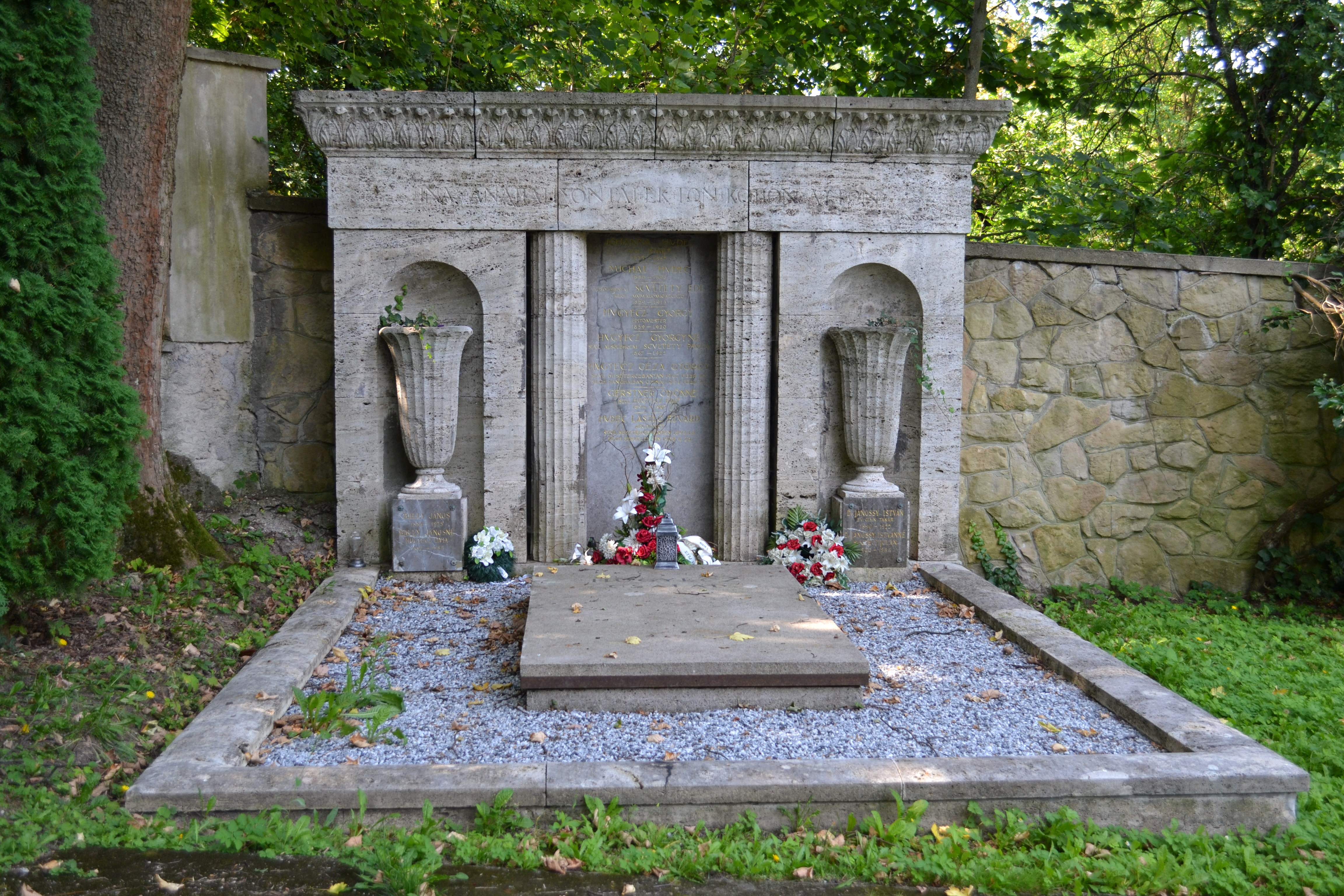 Banská Bystrica, hrobka rodiny Hudecovcov v evanjelickom cintoríne (hrobku navrhol člen ich rodiny Ladislav Eduard Hudec, svetoznámy architekt, ktorý postavil najznámejšie architektonické skvosty v Šanghaji a viacero známych budov v USA.) Ladislav Hudec zomrel v roku 1958 v Berkeley, ale želal si byť pochovaný v rodnej Banskej Bystrici, preto boli jeho pozostatky v roku 1970 prenesené do ich rodinnej hrobky.